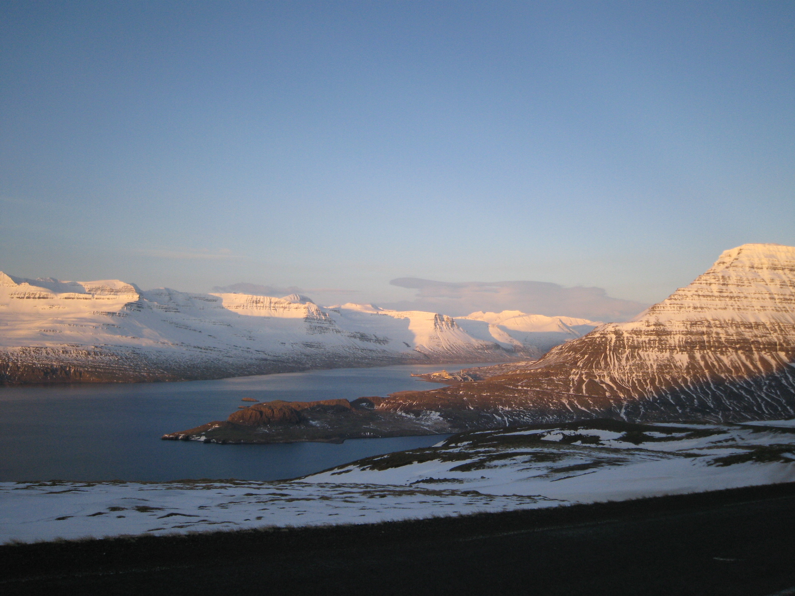 Fjarðaál en Reyðarfjörður, Islandia 2007